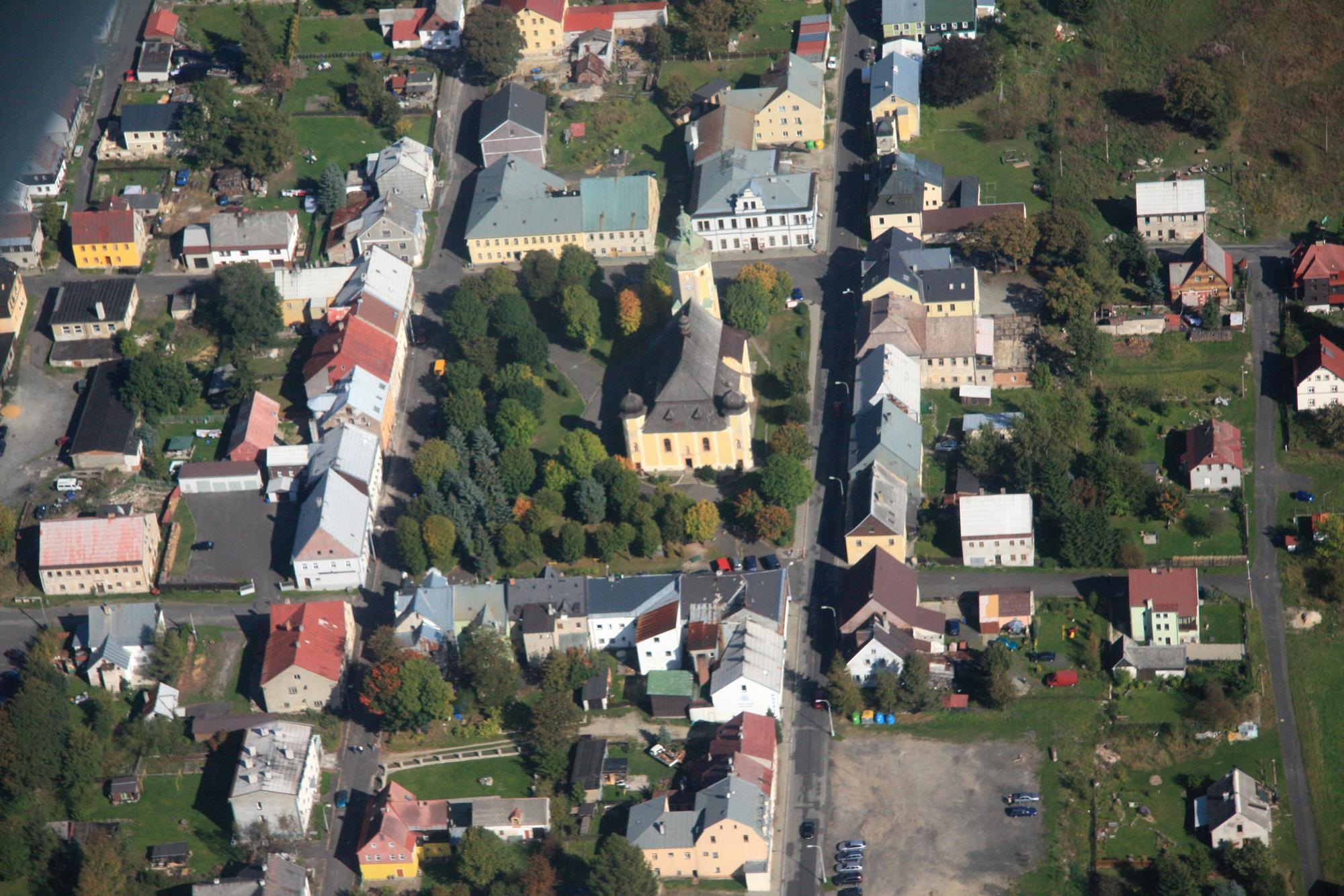 Horní Blatná letecky